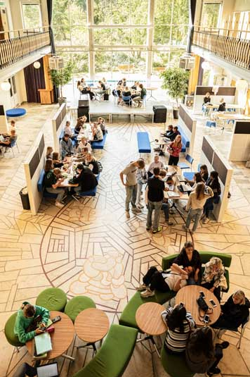 mosaik